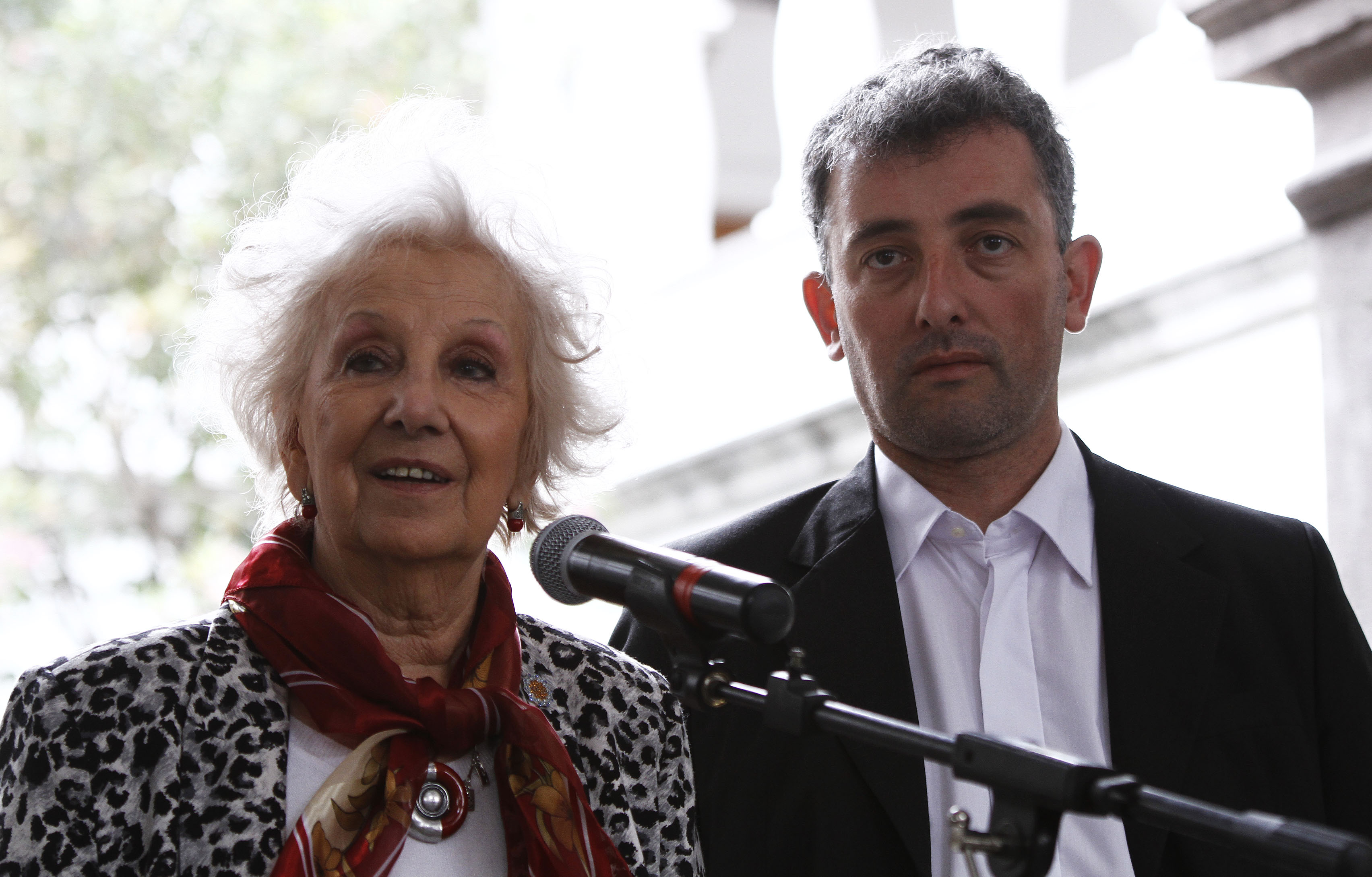 Quito, 14 oct (Andes).- Estela de Carlotto, presidenta de la organización Abuelas de Plaza de Mayo de Argentina, y su nieto Ignacio Hurban, quien recuperó su identidad 36 años después de que desapareció durante la dictadura, mantuvieron una entrevista con el jefe de estado Rafael Correa en el palacio de Carondelet. Foto: Micaela Ayala V./Andes